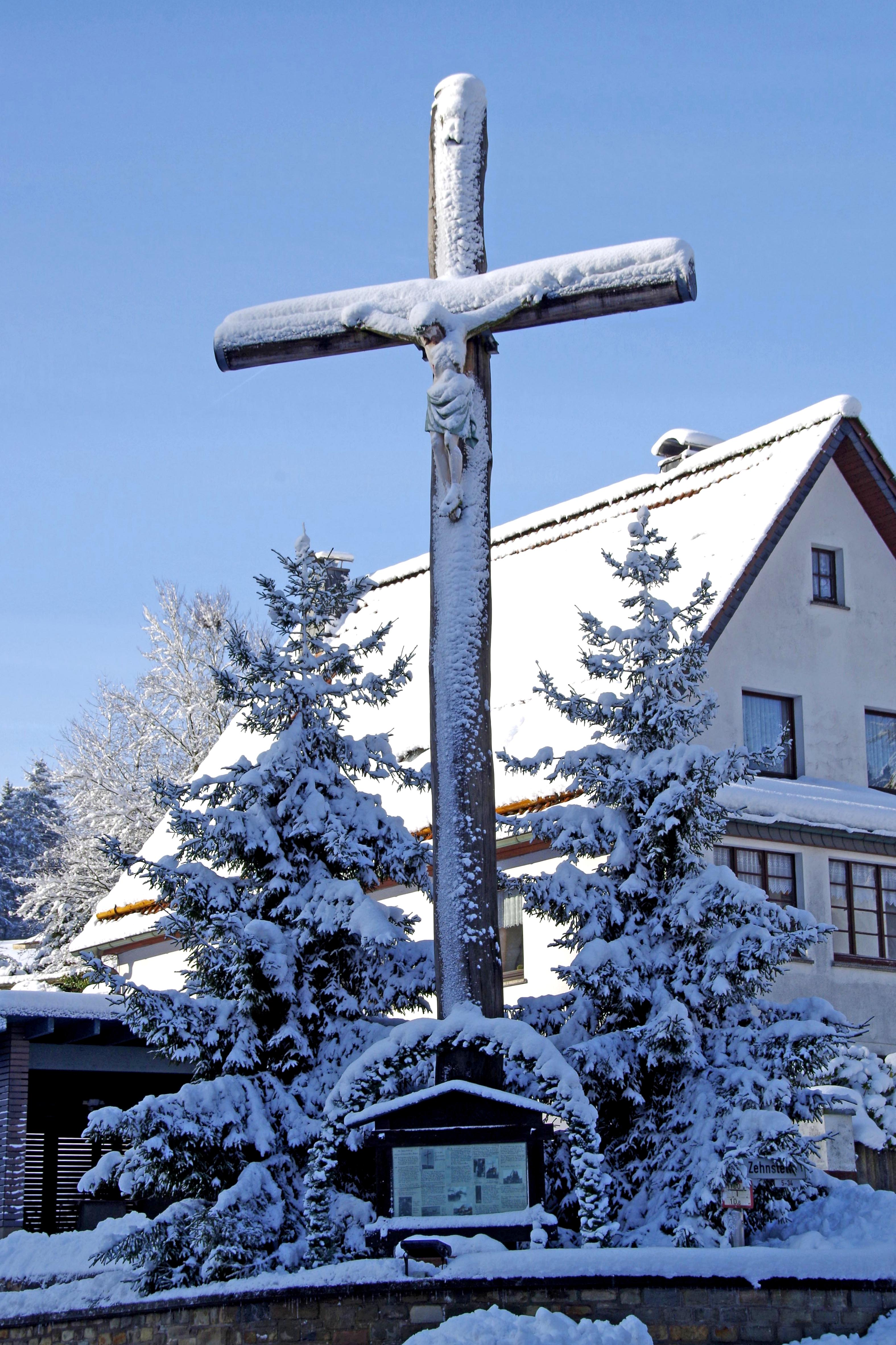 Zehnstelle, Kreuz an der L17